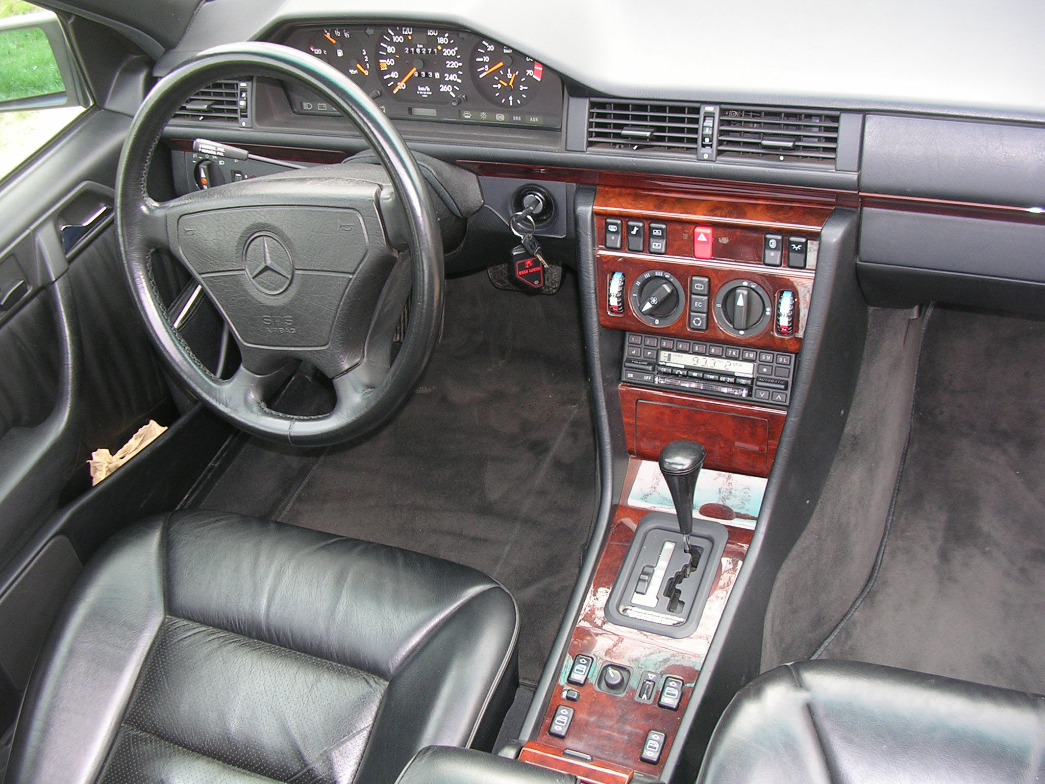 Intérieur.jpg